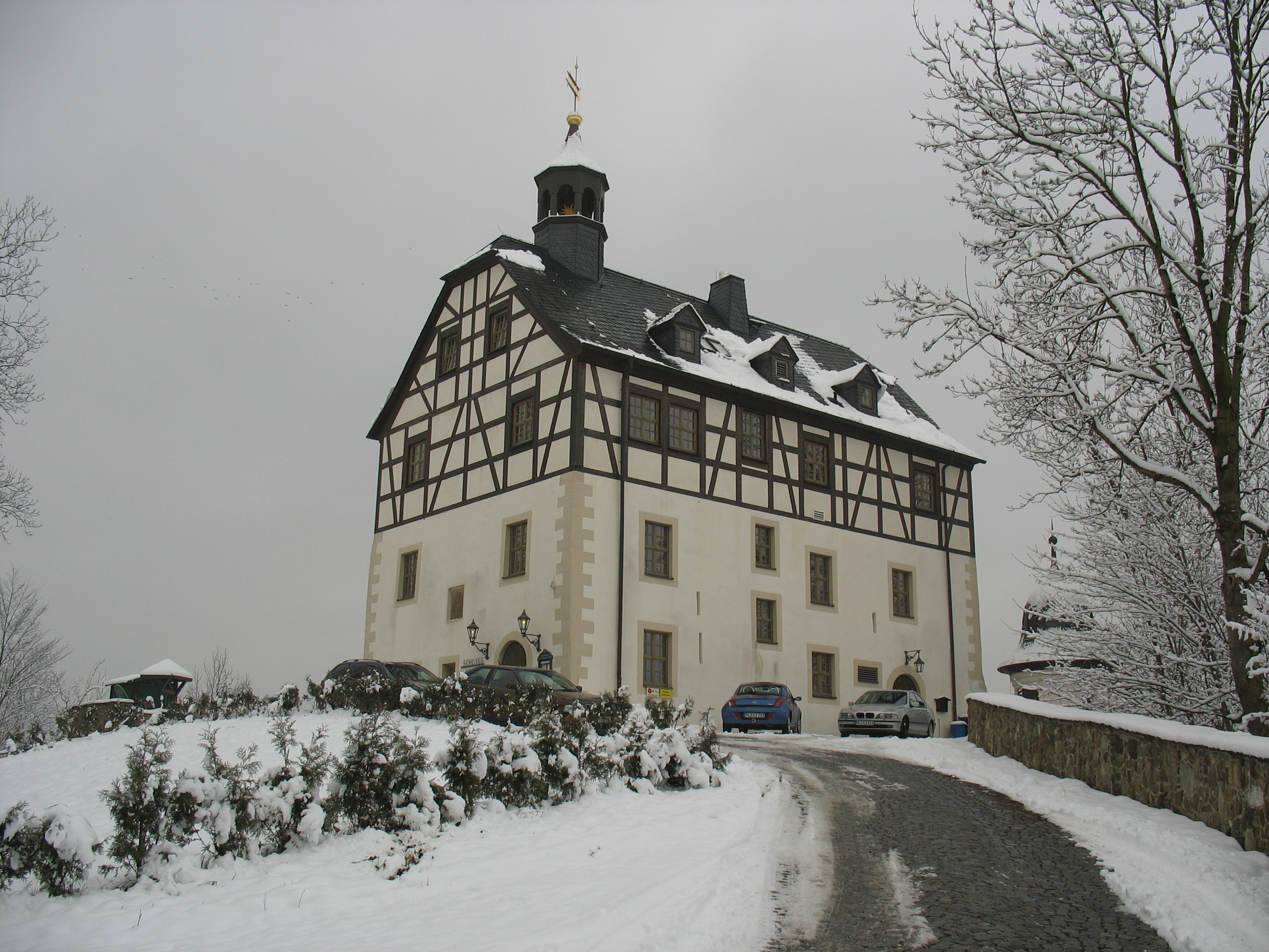 Plauen - Ortsteil Jößnitz, Das erhalten gebliebende Nebenschloss von Schloss Jößnitz